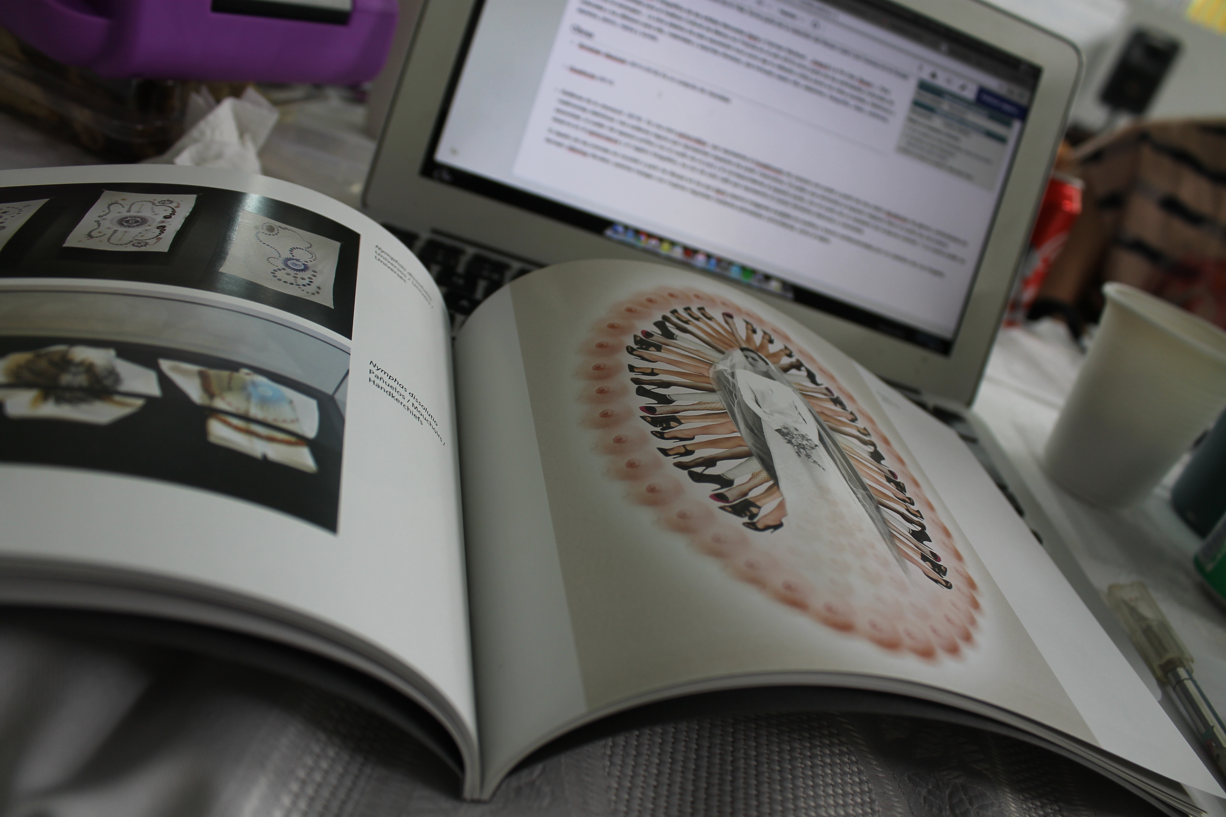 Editatona Arte y Feminismo 2019